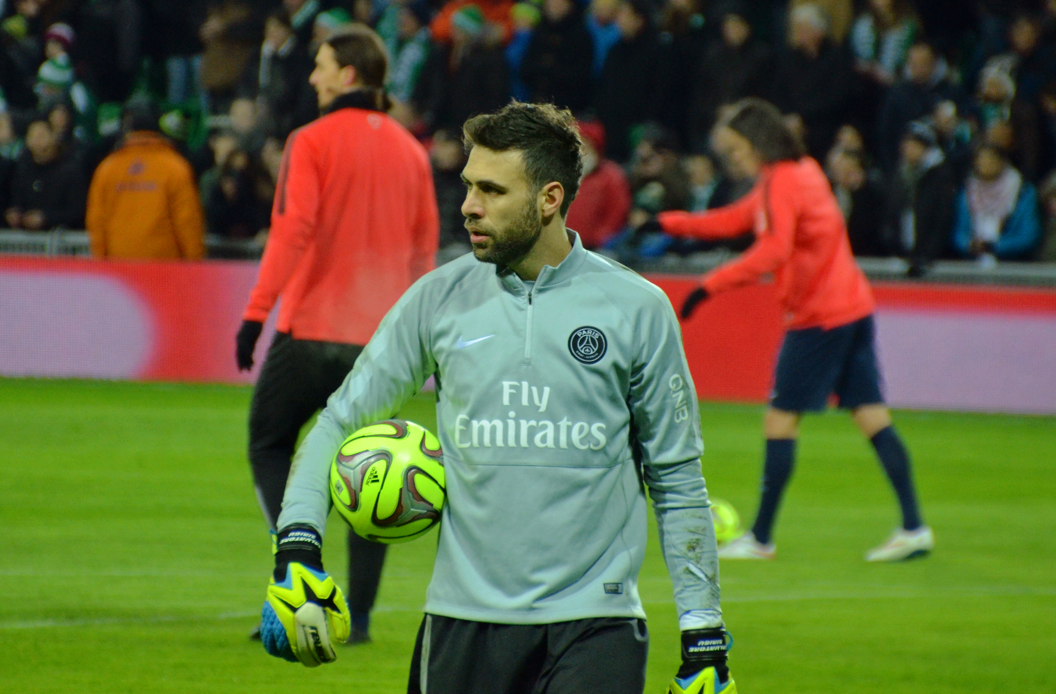 Salvatore Sirigu à l'avant-match de Saint-Etienne - Paris Saint Germain le 25 janvier 2015